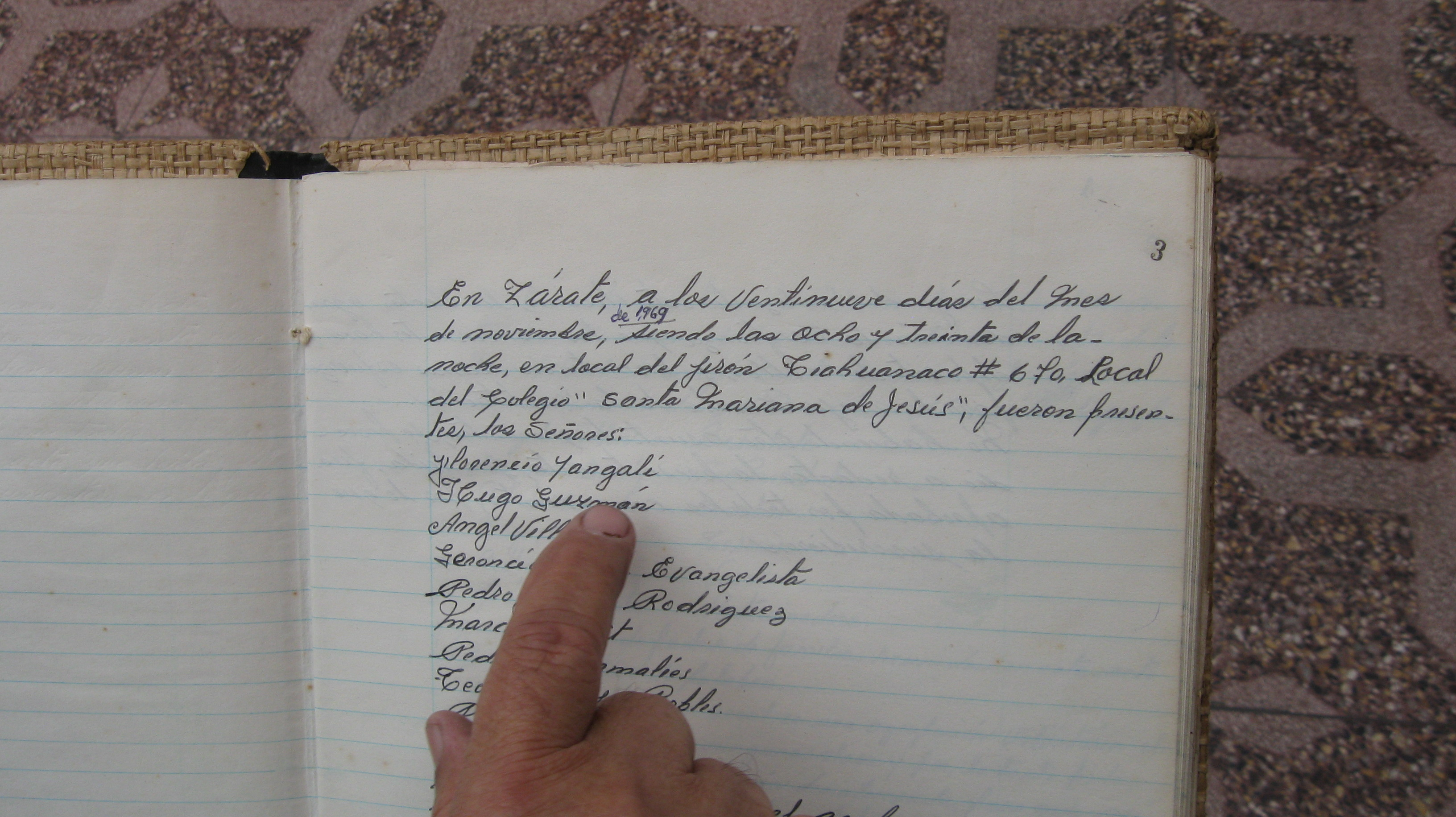 es el acta de fundacion del grupo scout ya que este año en noviembre cumple 40 años